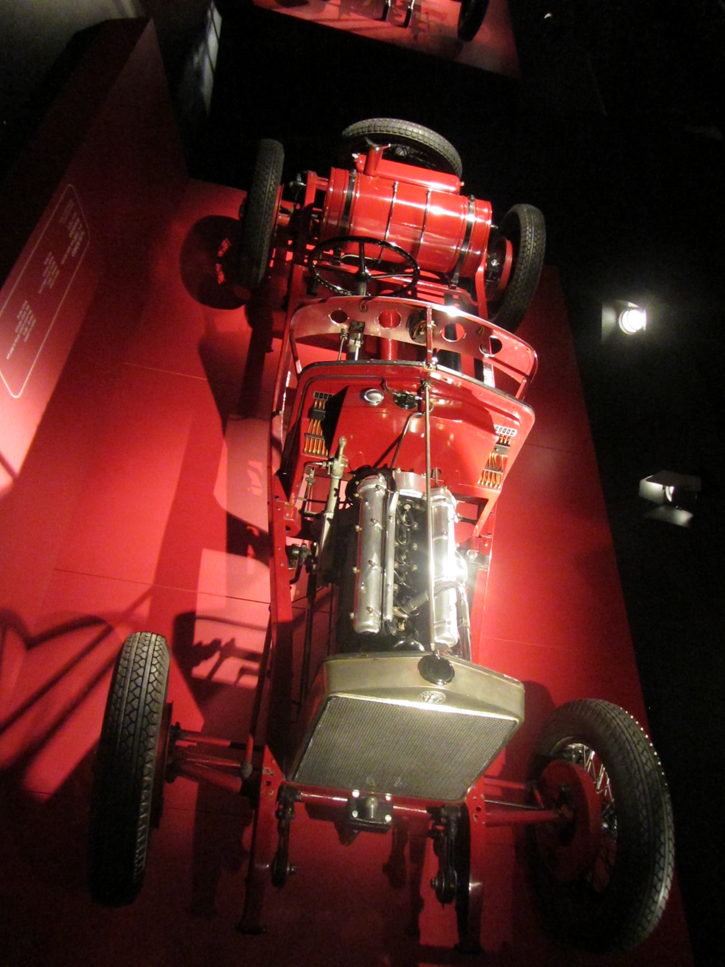 Alfa Romeo autotelaio 6C 1500 "Mille Miglia Speciale" Italia: 1928 Motore: 6 cilindri 1487 cc 76CV a 4800giri Vel Max: 160Km/h peso: 860 kg